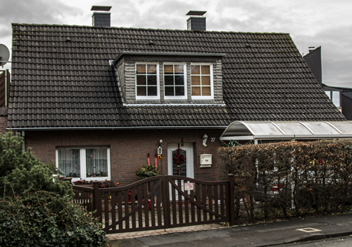 Wohnhaus der Familie Rosenthal im Sölder Kirchweg 27